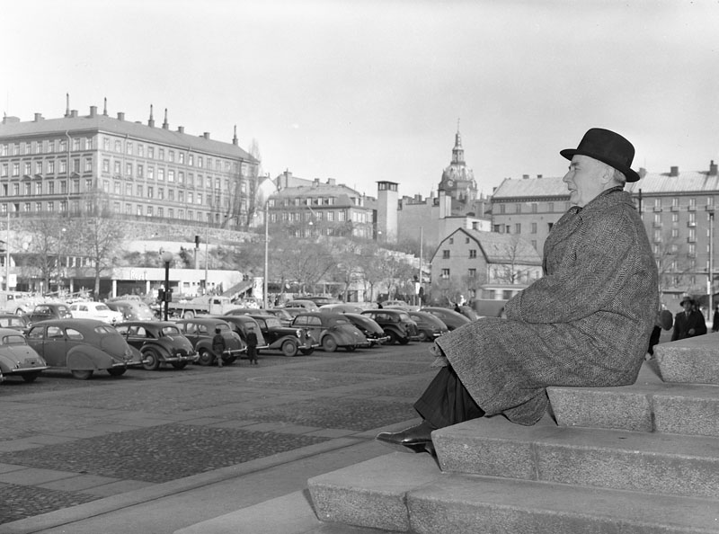 Medborgarplatsen. Borgarrådet Harry Sandberg tittar ut över torget från Medborgarhusets trappa Plats: Kvarteret PELARBACKEN STÖRRE. Björns Trädgård (Medborgarplatsen). Medborgarplatsen. Södermalm.